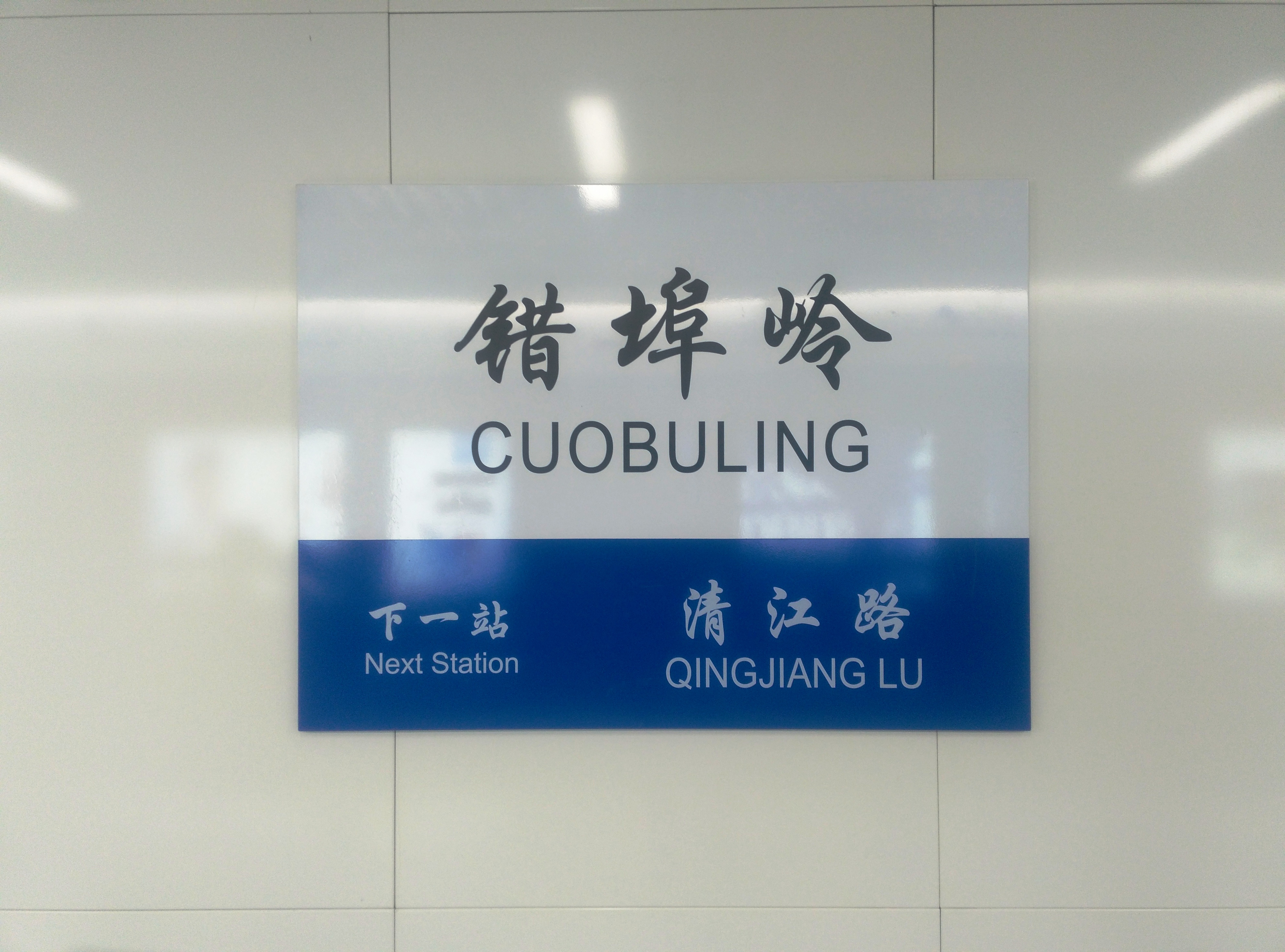 错埠岭下行大字